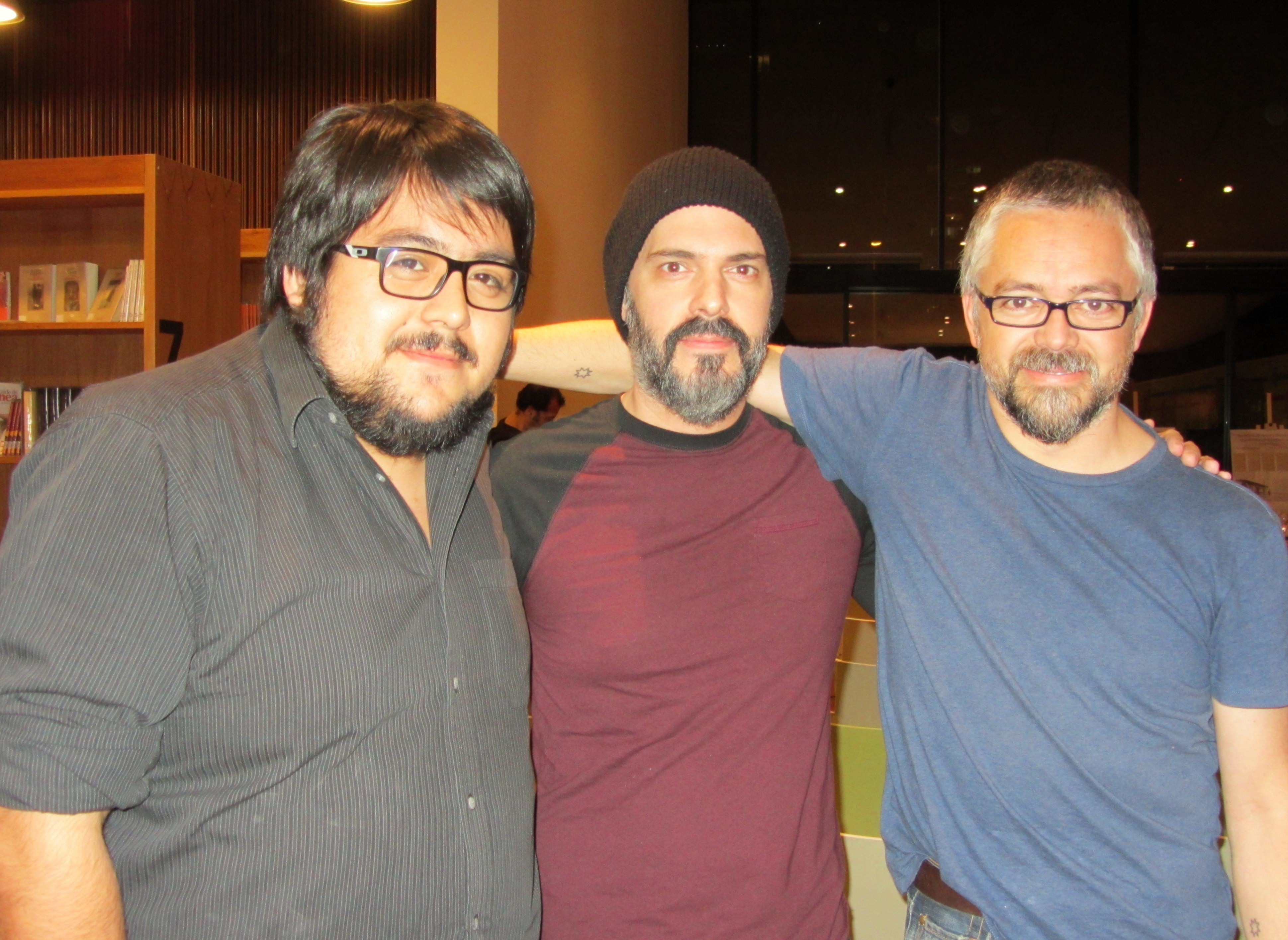 Los escritores Diego Zúñiga, Mike Wilson y Jorge Baradit en la presentación del libro de Macarena Areco Cartografía de la novela chilena reciente: realismos, experimentalismos, hibridaciones y subgéneros, realizada en el Centro Cultural Gabriela Mistral el 2 de abril de 2015